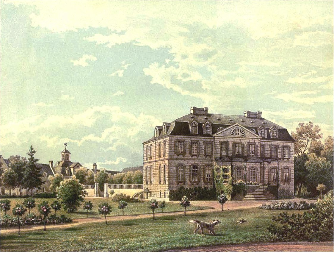 Schloss Bornheim, Kreis Bonn